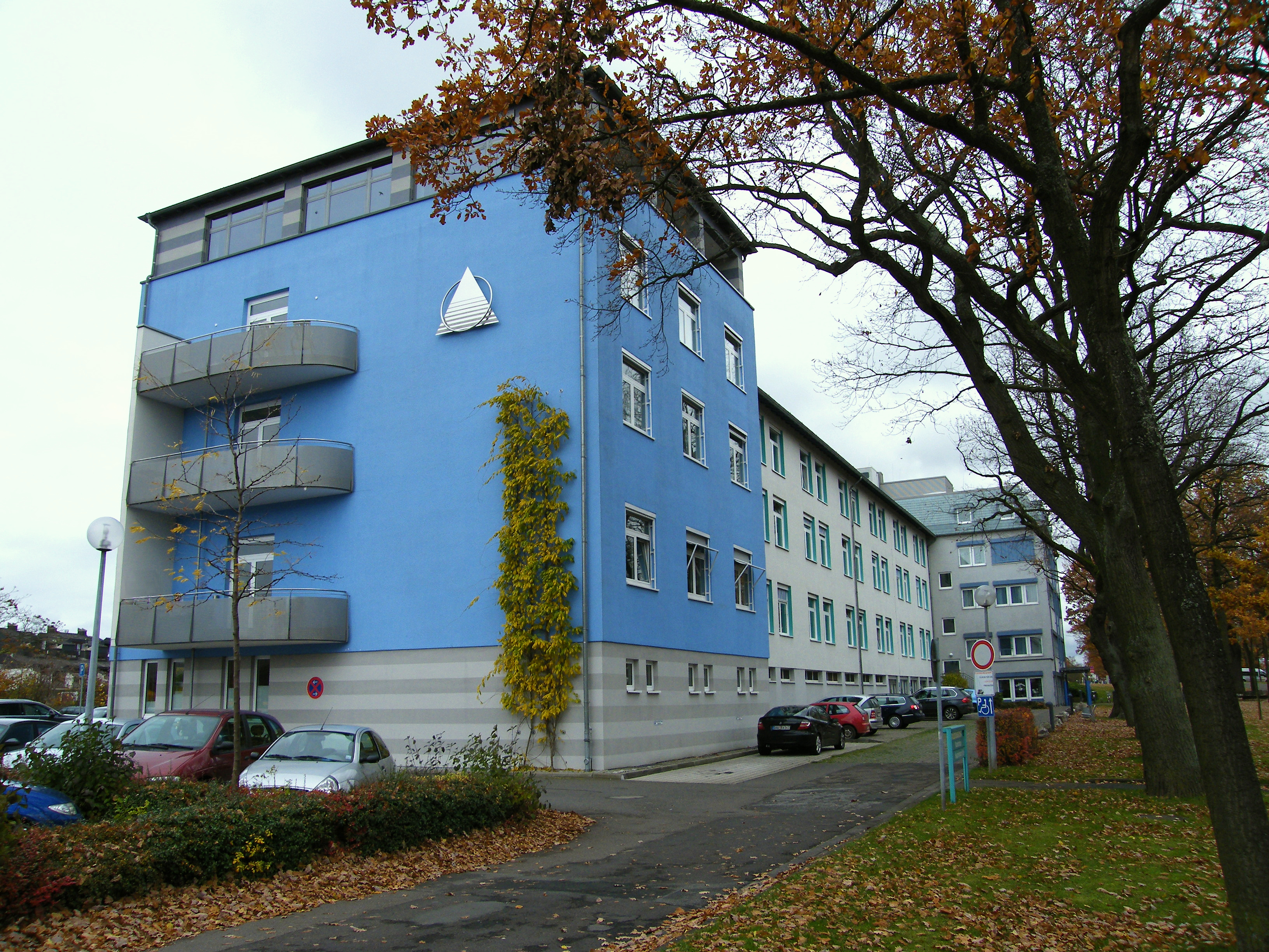 Stadtkrankenhaus Bad Arolsen, Große Allee 50 - Gesundheit Nordhessen Holding